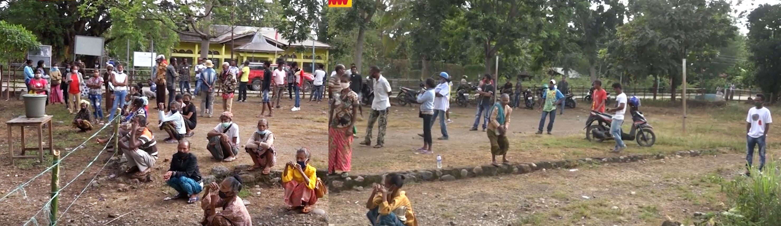 Suco Holsa at the office of the suco